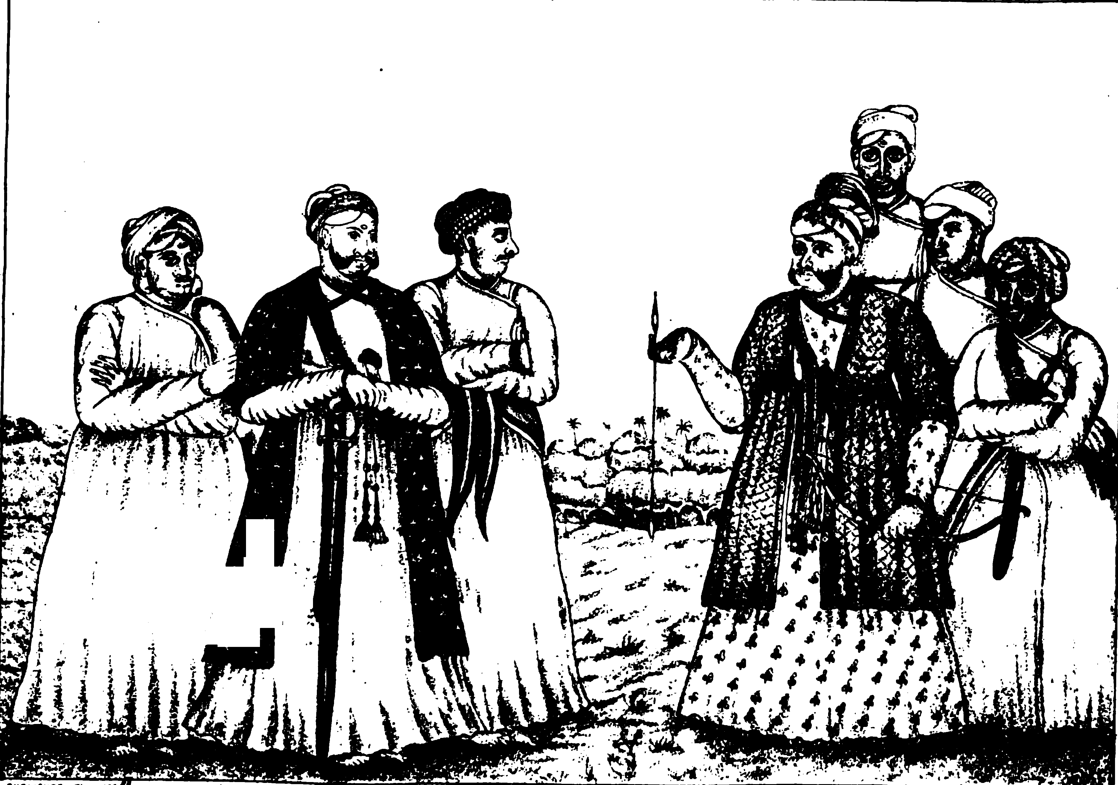 The Maha Rajah and his attendants